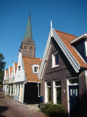 Nieuwendam, aanzicht op